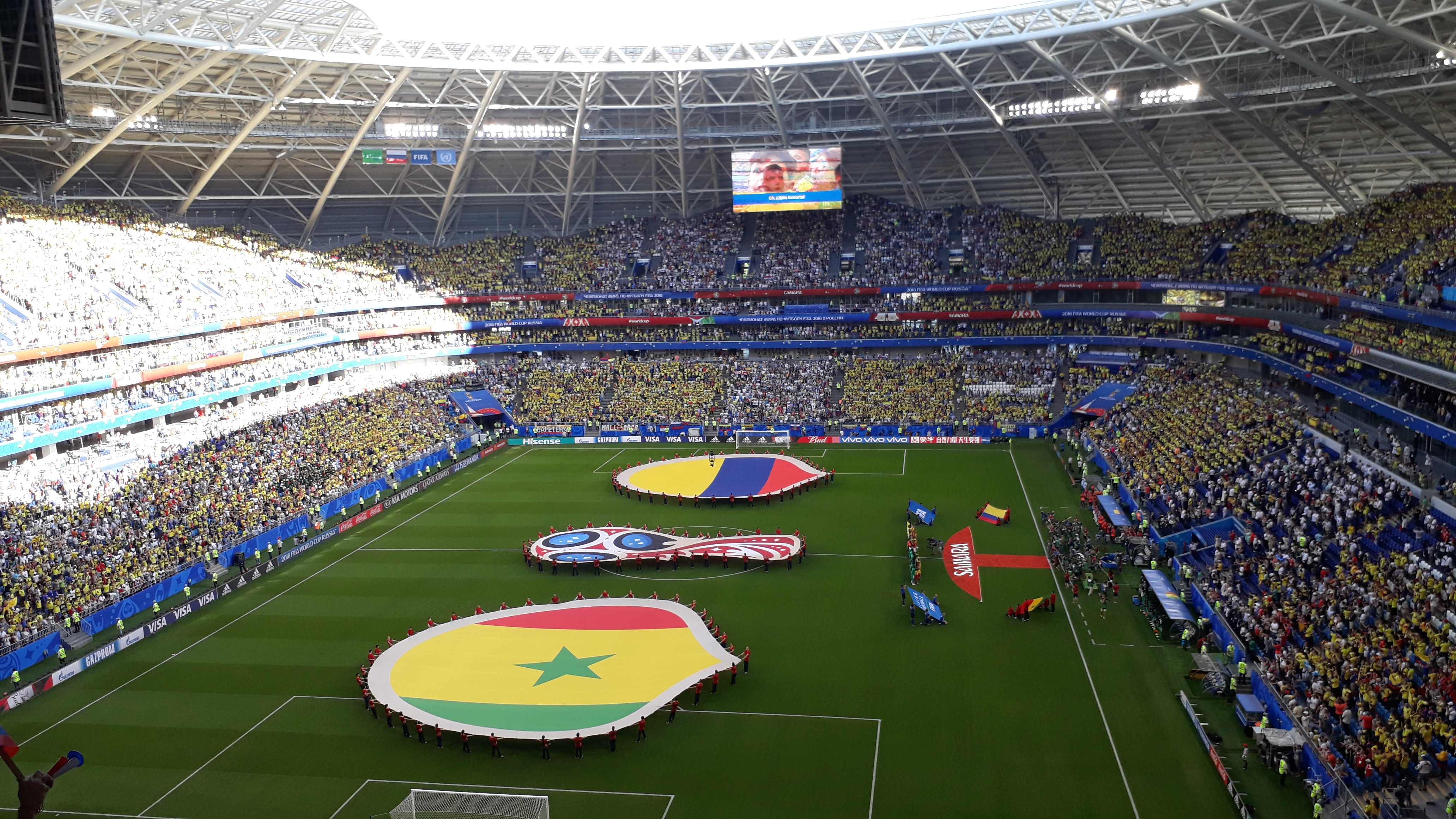 matchday 3